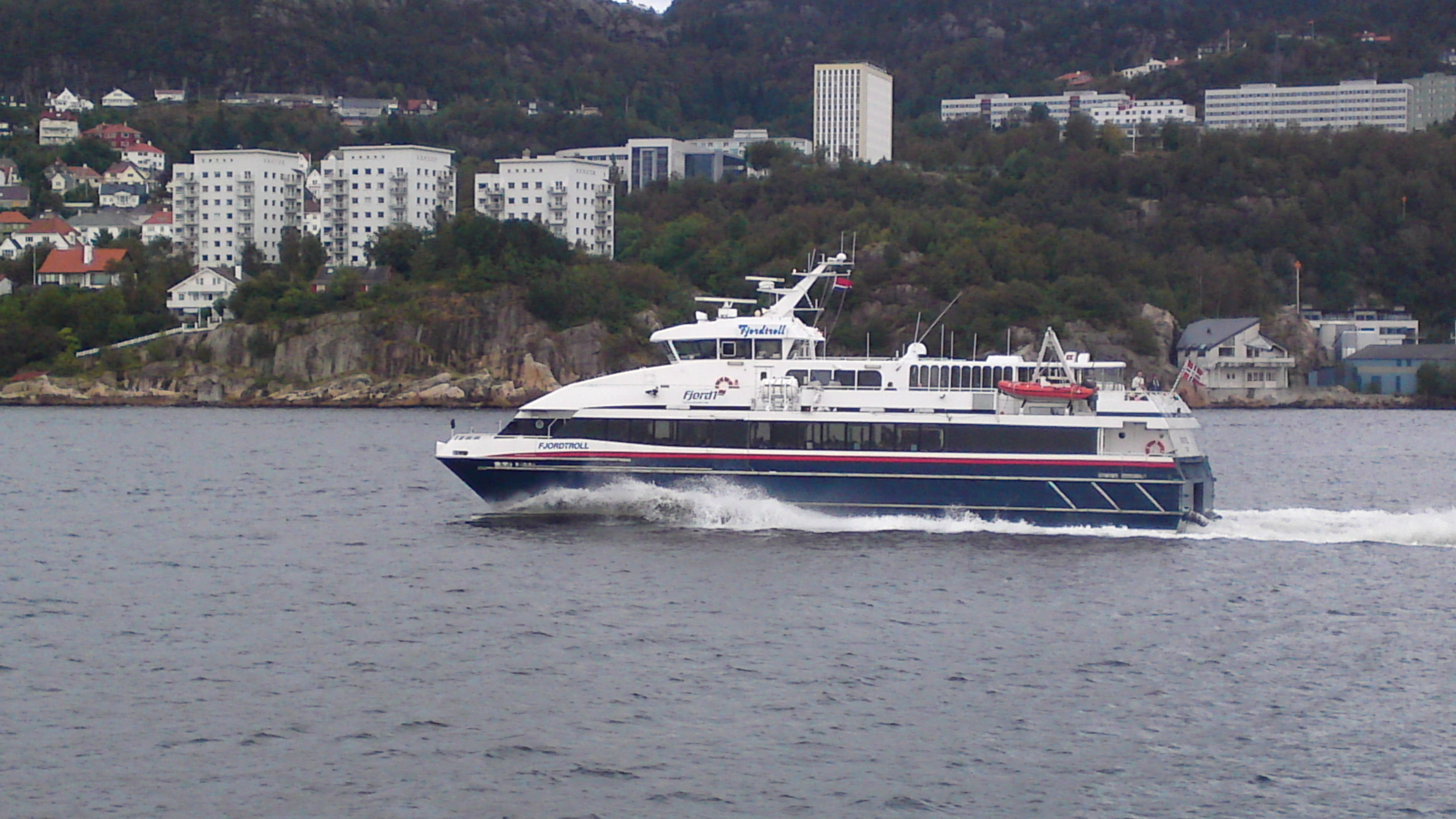 Bilete av M/S Fjordtroll teke frå M/S Kommandøren.